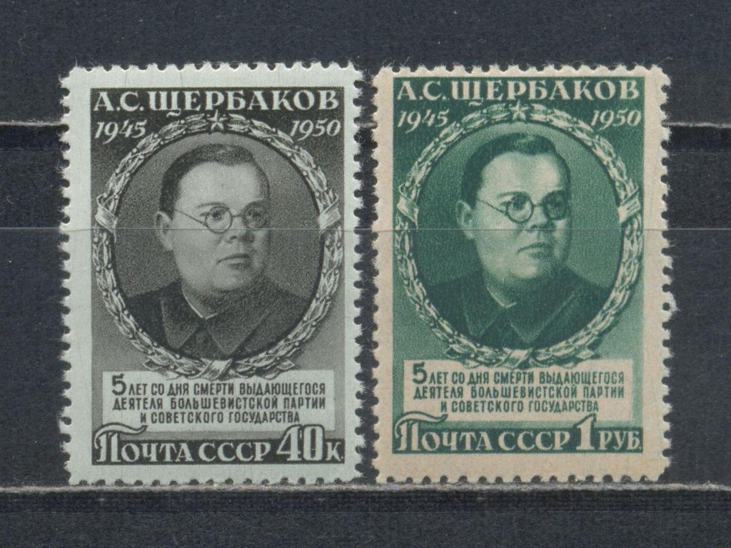 Марка СССР. "5 лет со дня смерти выдающегося деятеля большевистской партии и советского государства Щербаков Александр Сергеевич"